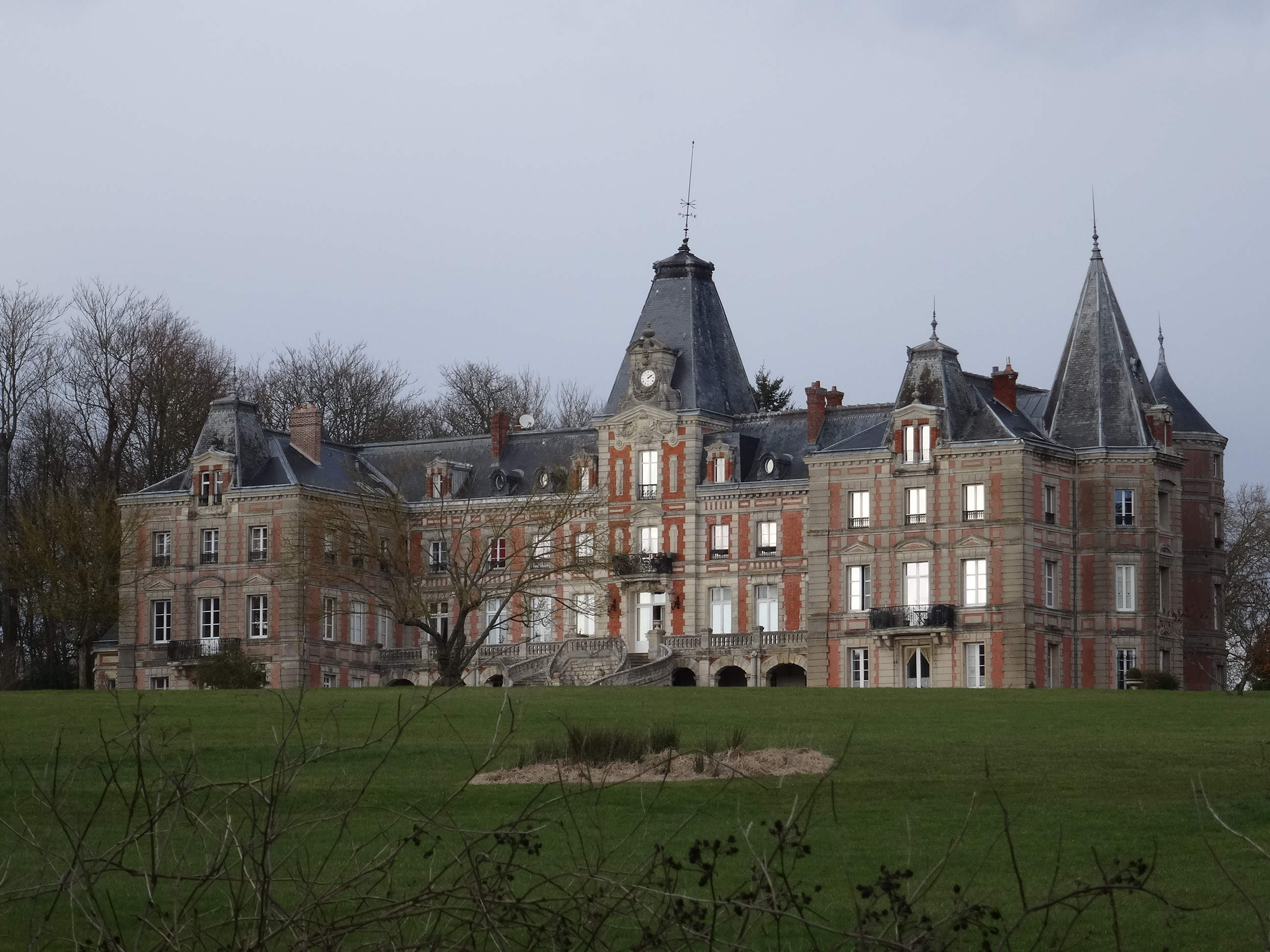 Château de Montgermont à Pringy. (Seine-et-Marne, région Île-de-France).